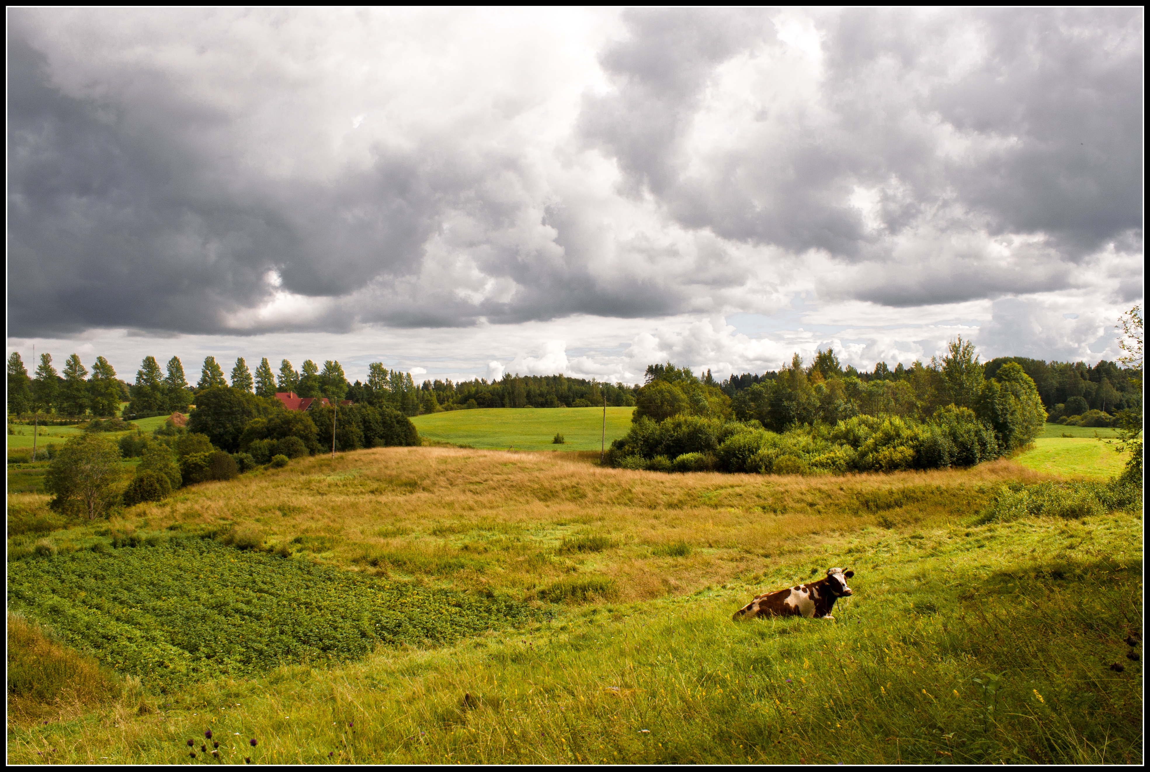 Vecpiebalga